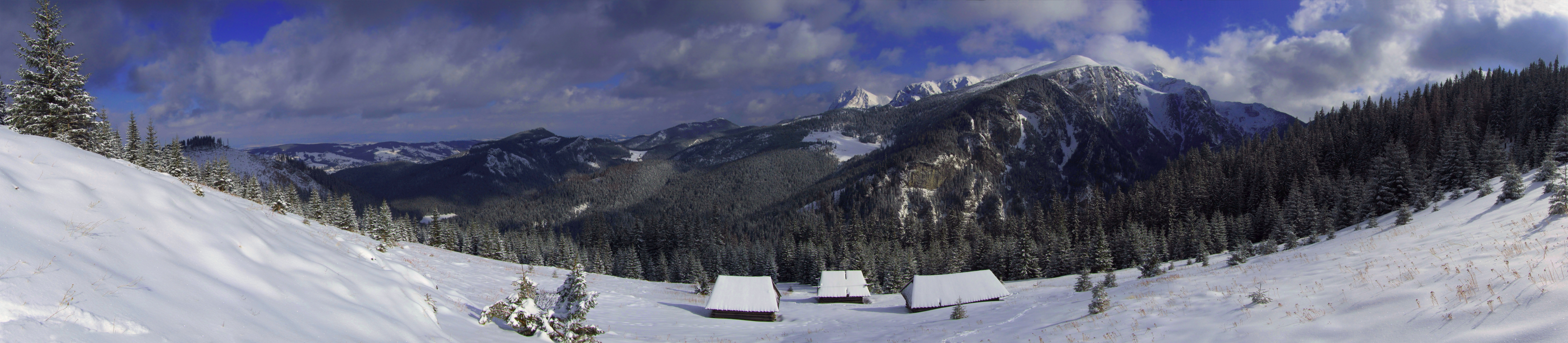 Polana na Stołach w Tatrach i panorama widokowa z polany